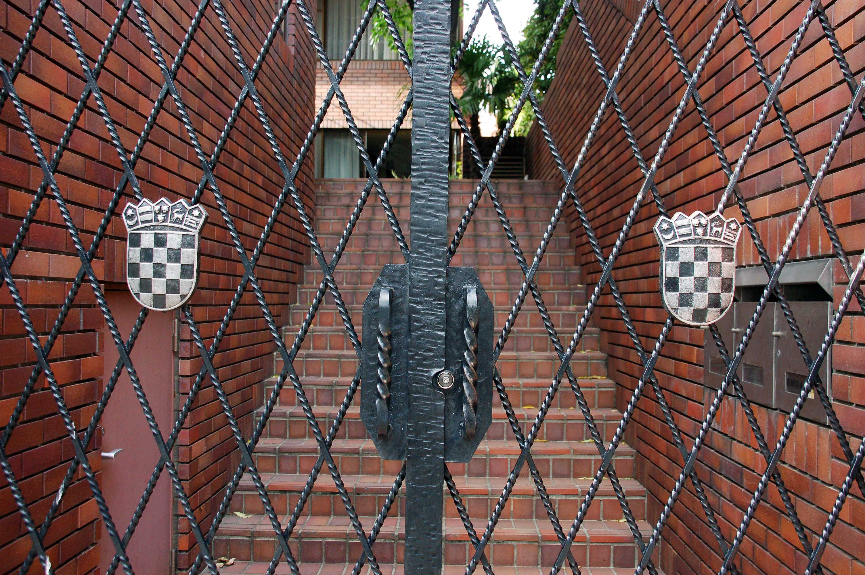 2006.05.22 16:16, Tokyo Hiroo (広尾・クロアチア大使館）